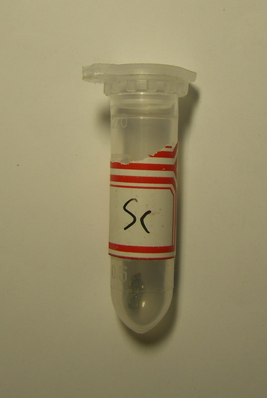 Scandium metal